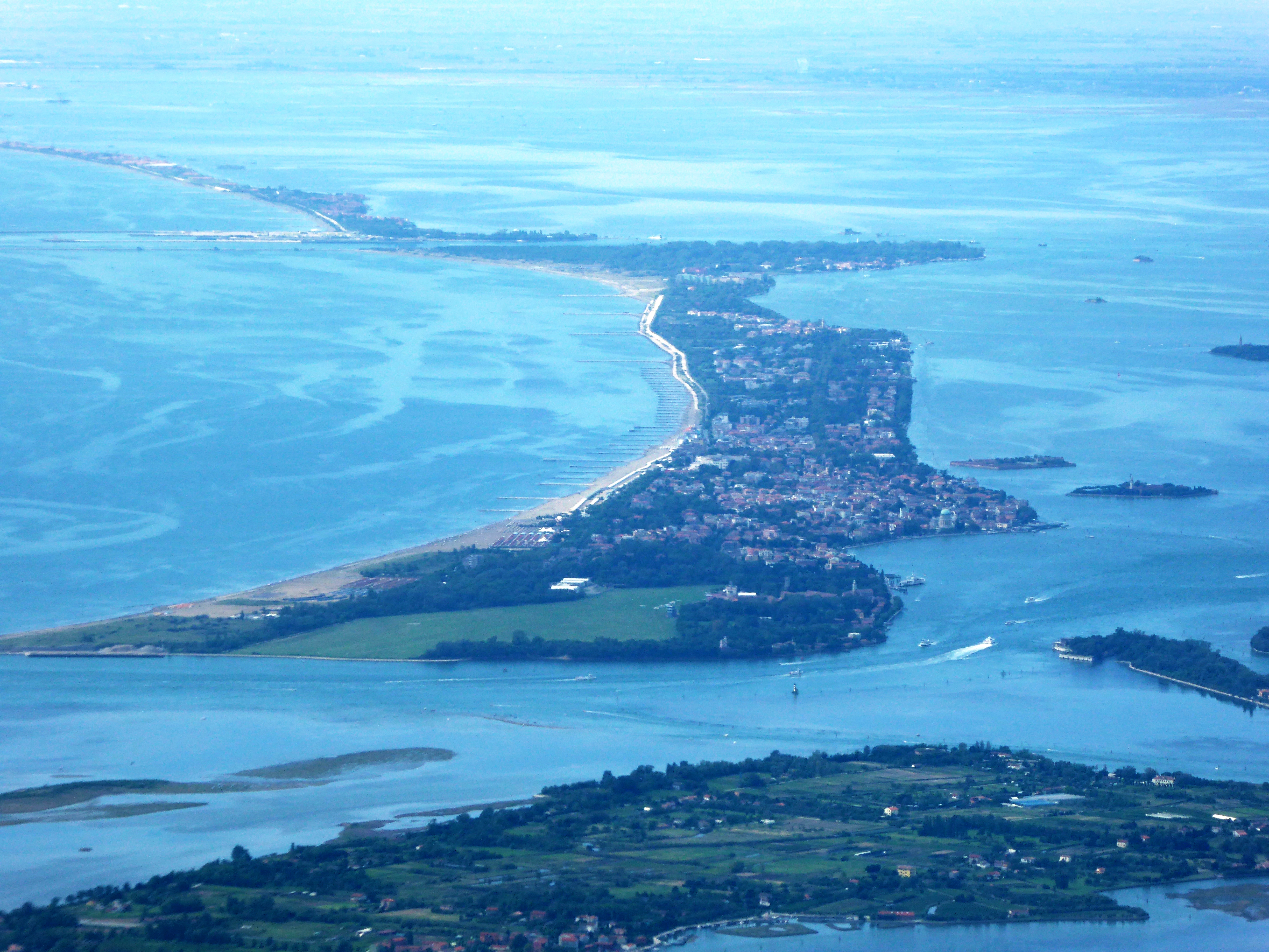 Lido di Venezia